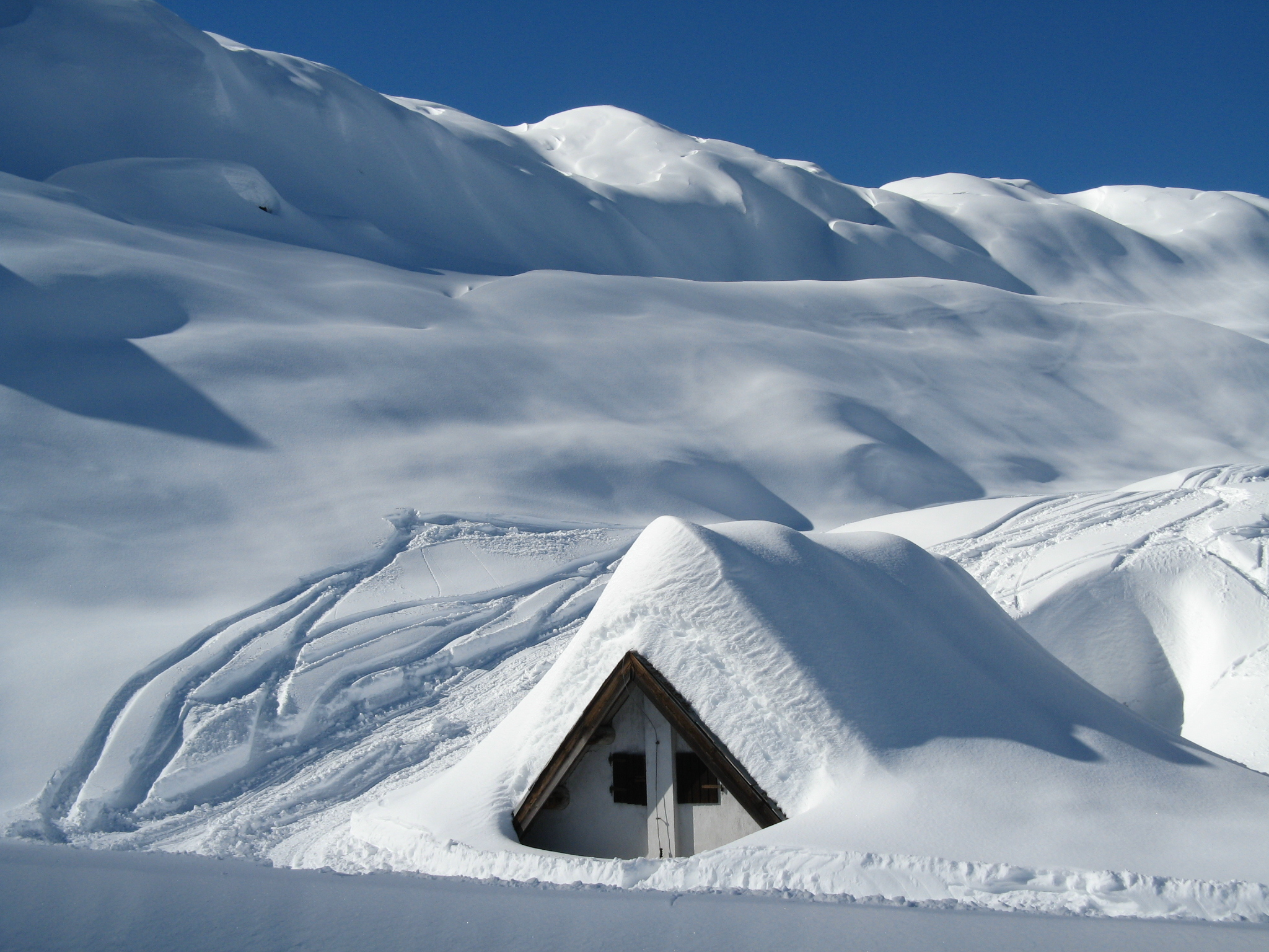 Baita innevata presso il Rifugio Albani - Val Seriana (Bergamo)